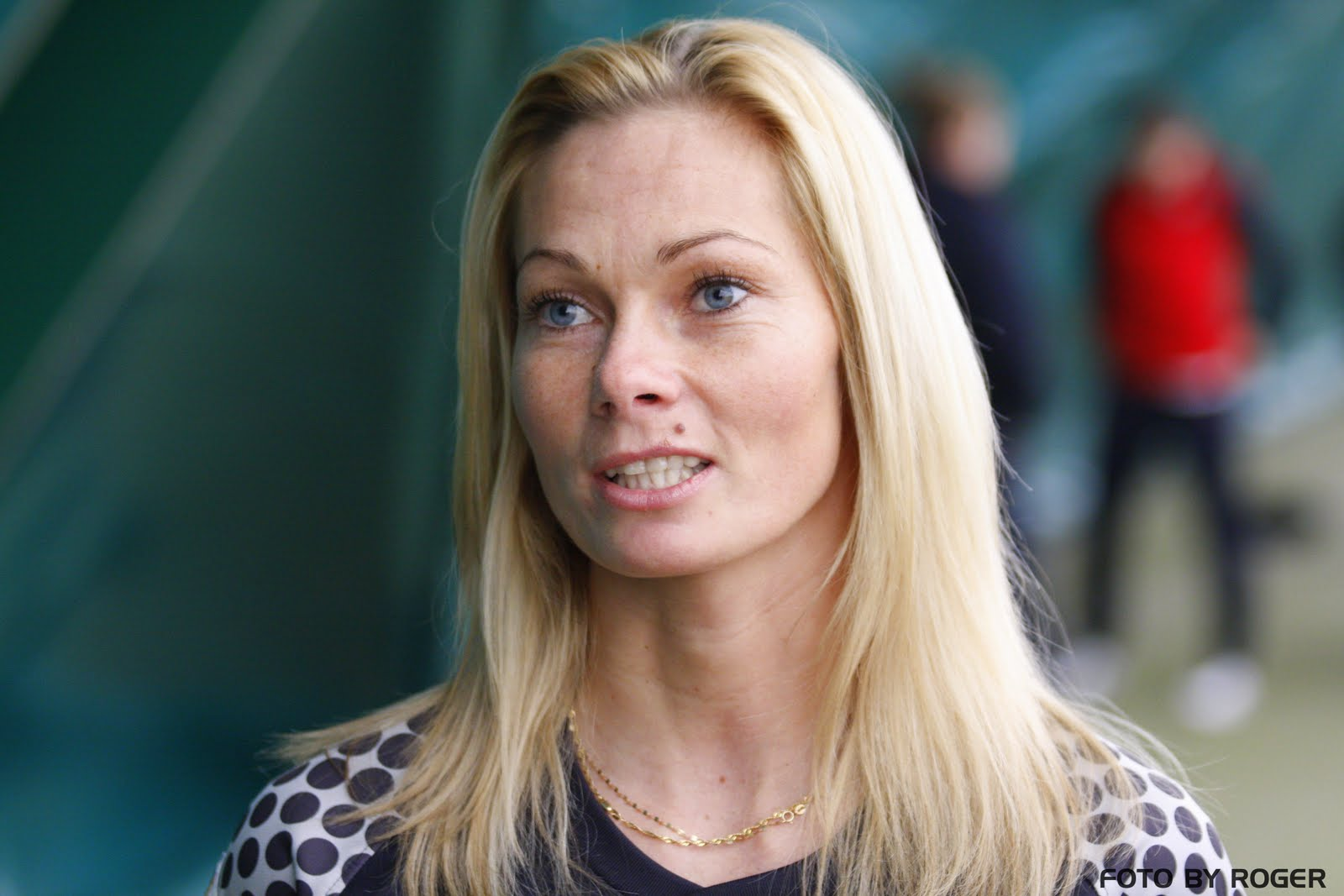 Daria Antończyk, polska piłkarka.